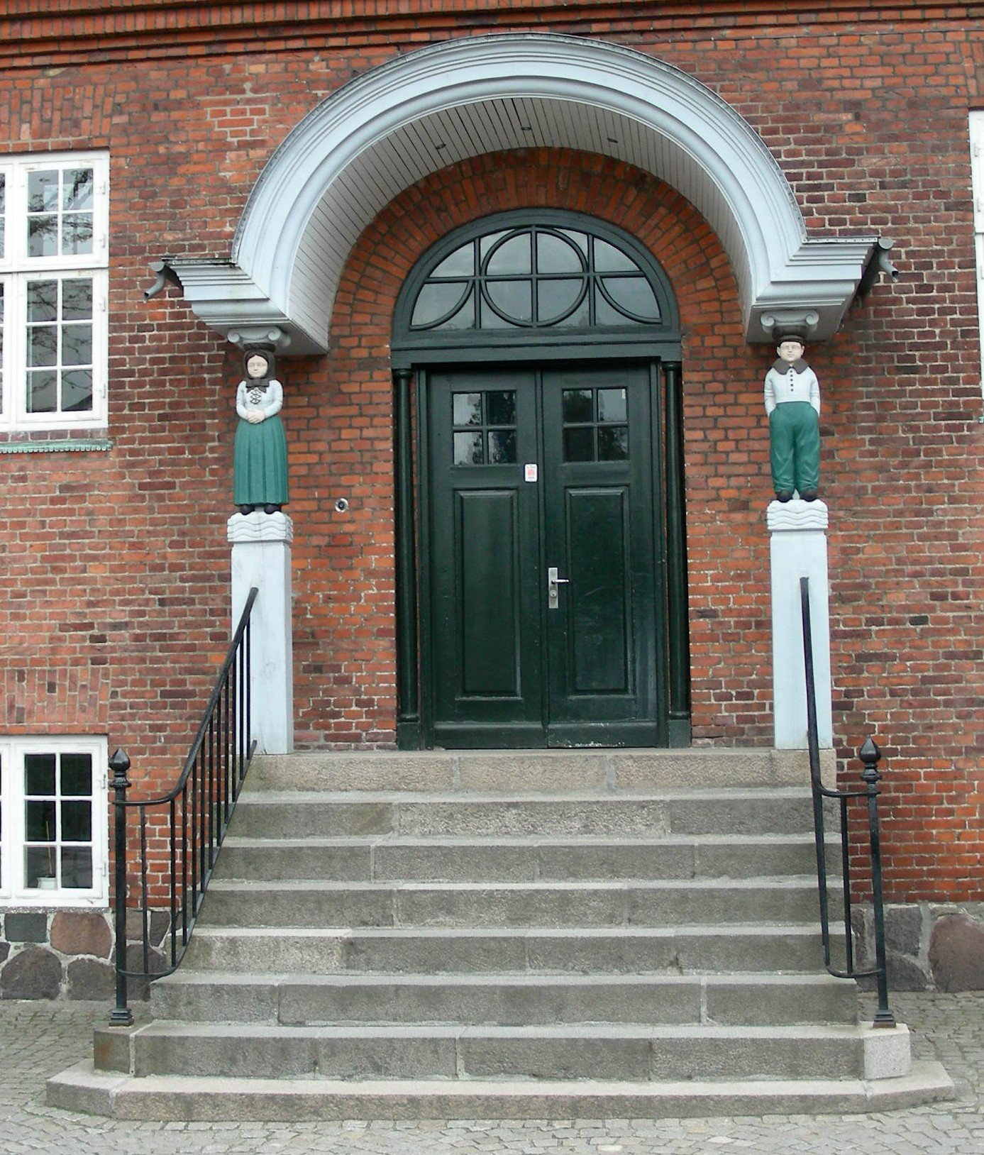 New entrance to Tøxens Skole, Køge, Denmark.